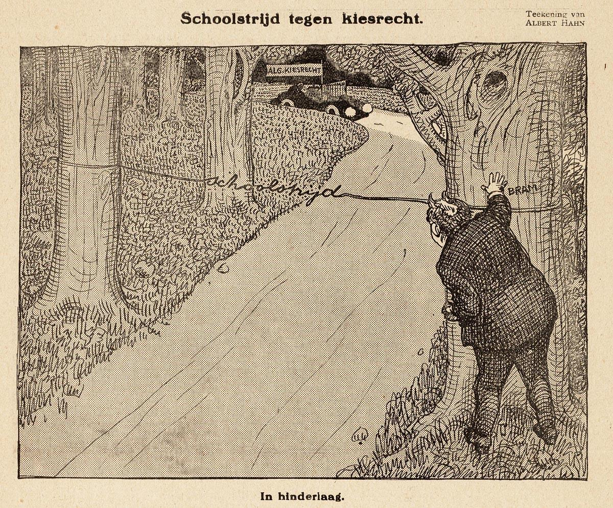 Schoolstrijd tegen kiesrecht. In hinderlaag - Albert Hahn (1915). BG C6/371 (prent), De Nederlandse arbeidersbeweging tot 1918, Internationaal Instituut voor Sociale Geschiedenis, Amsterdam.